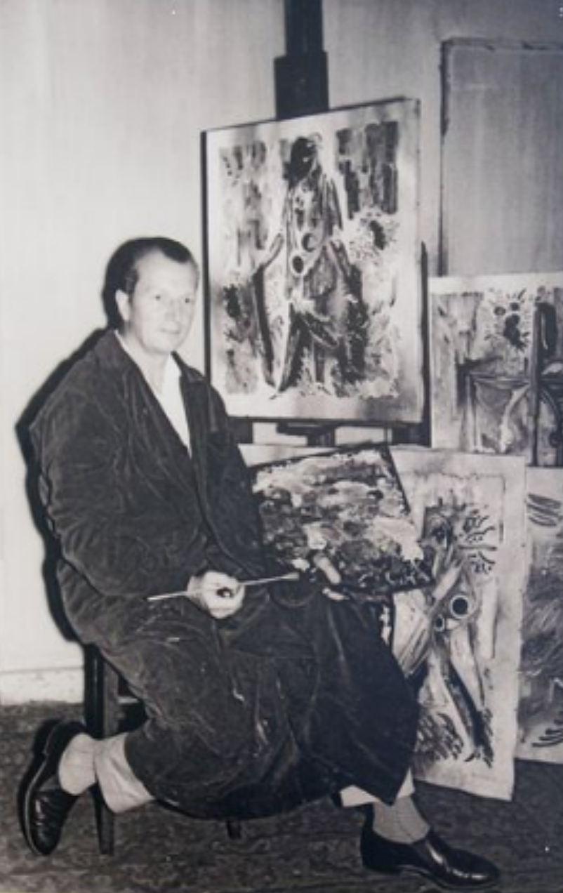 Artist